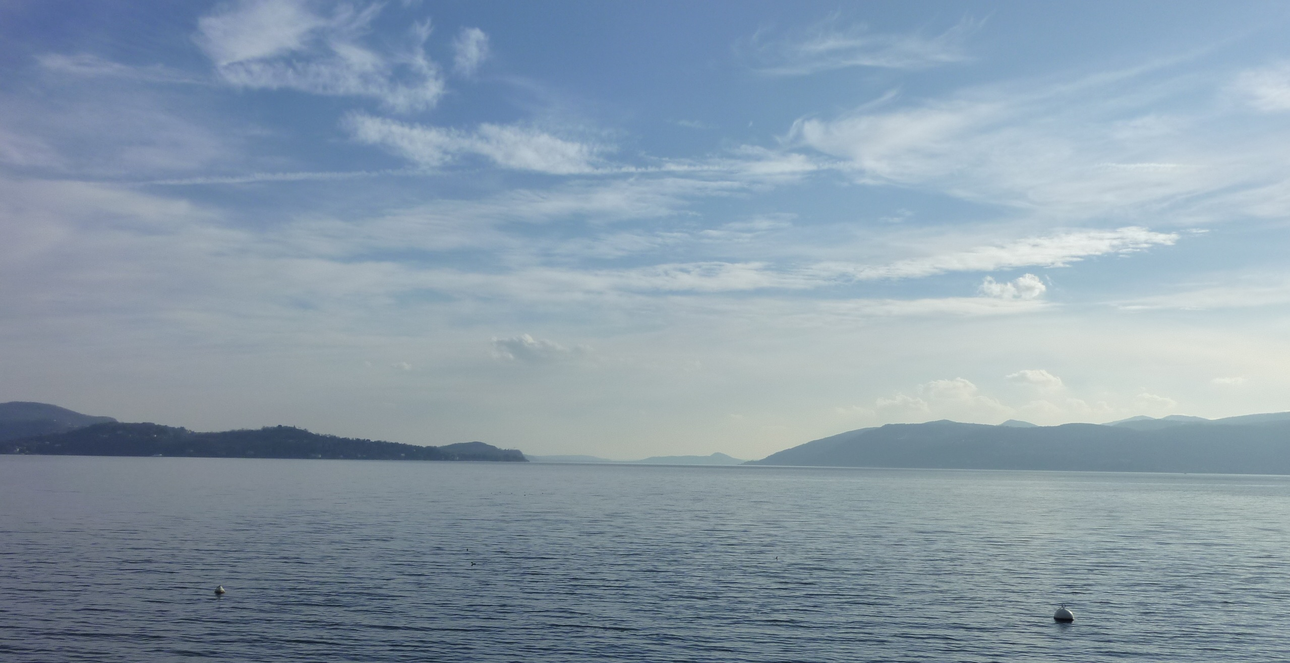 Lago Maggiore